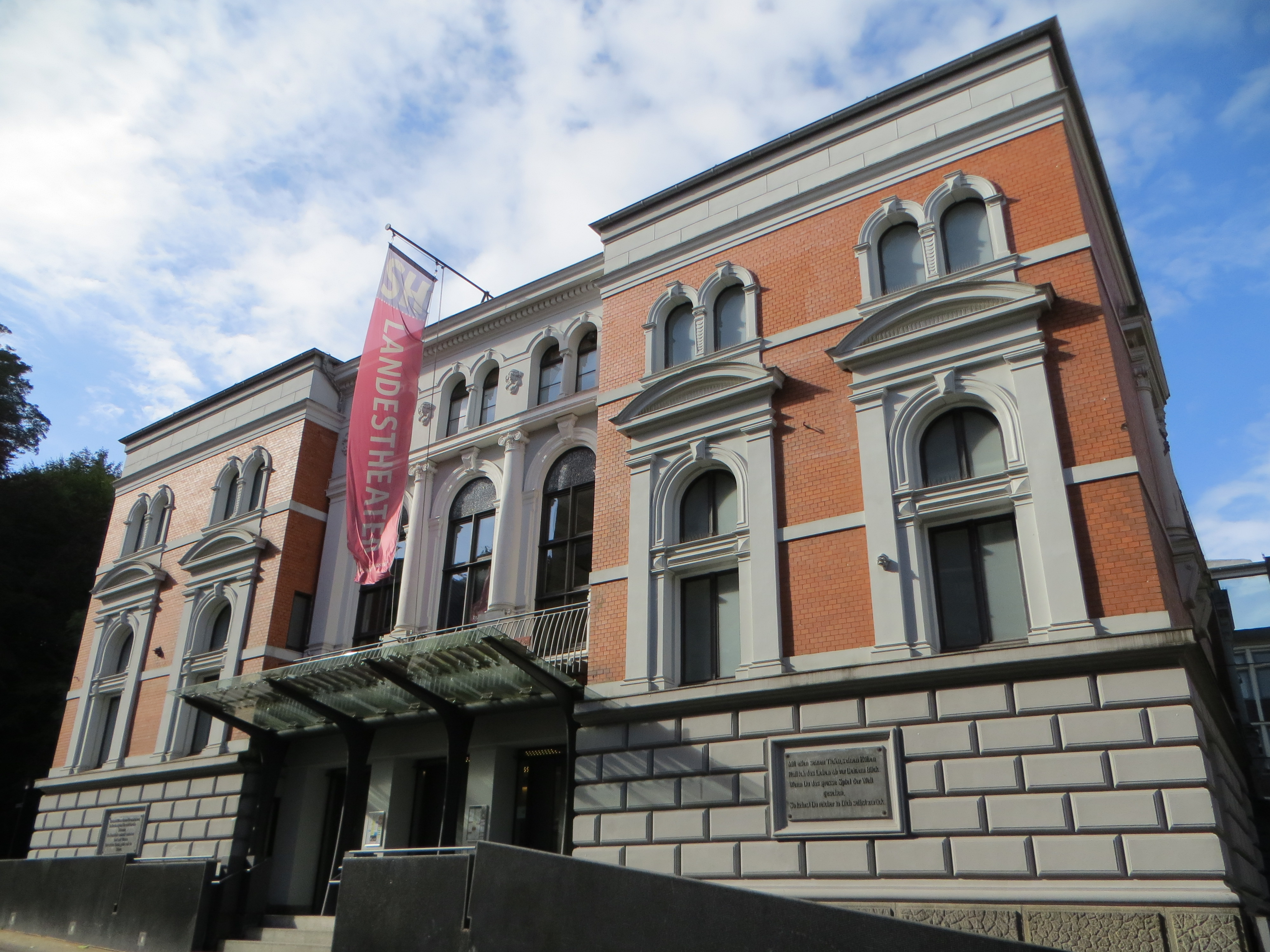 Stadttheater, Flensburg